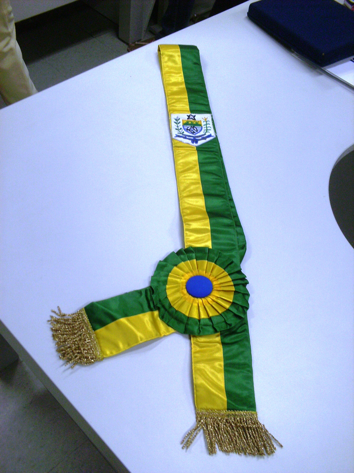 Faixa de governador(a) do Piauí em 2010. Essa foi substituída por outra para a posse de reeleição do governador Wilson Nunes Martins.